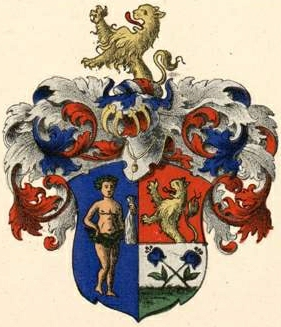 Vegesacki suguvõsa aadlivapp